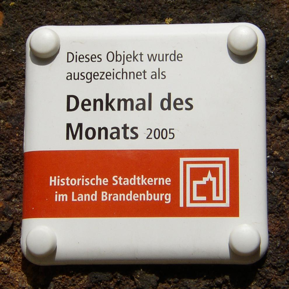 Plakette „Denkmal des Monats“ an der Nikolaikirche in Luckau in Brandenburg, Deutschland